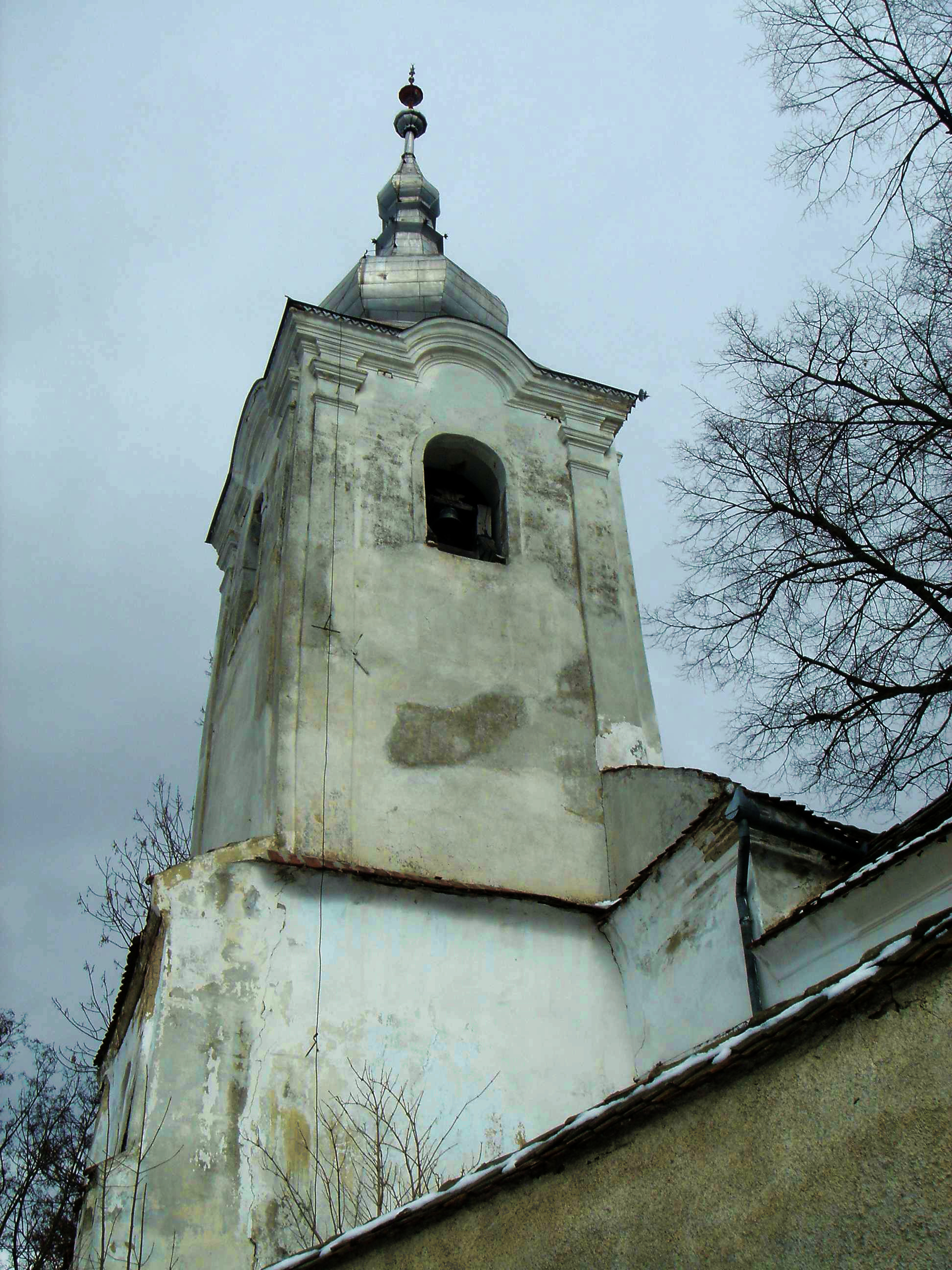 Biserica Reformata